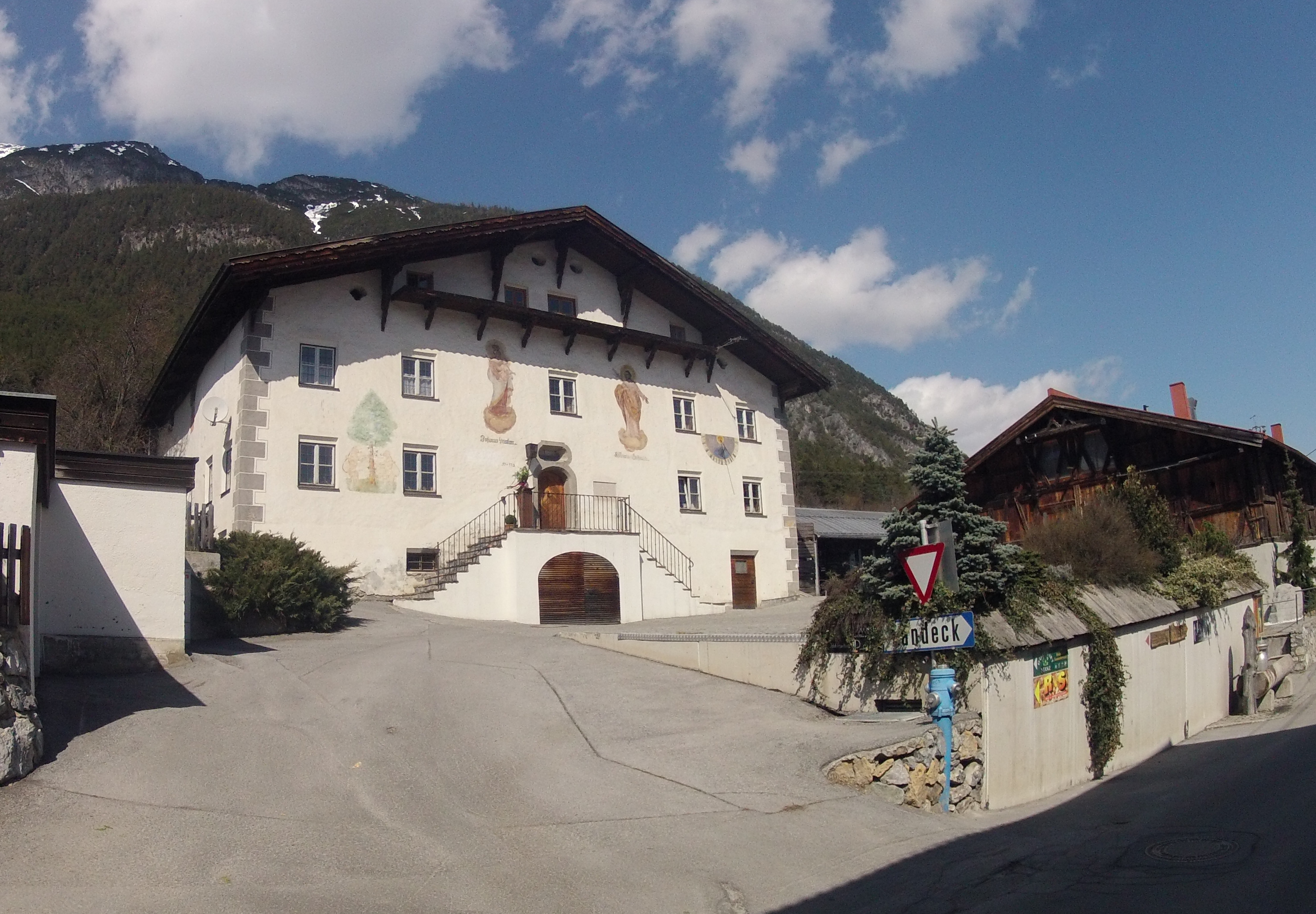 Ehem. Gasthof Löwen Geburtshaus von Jakob Prandtauer